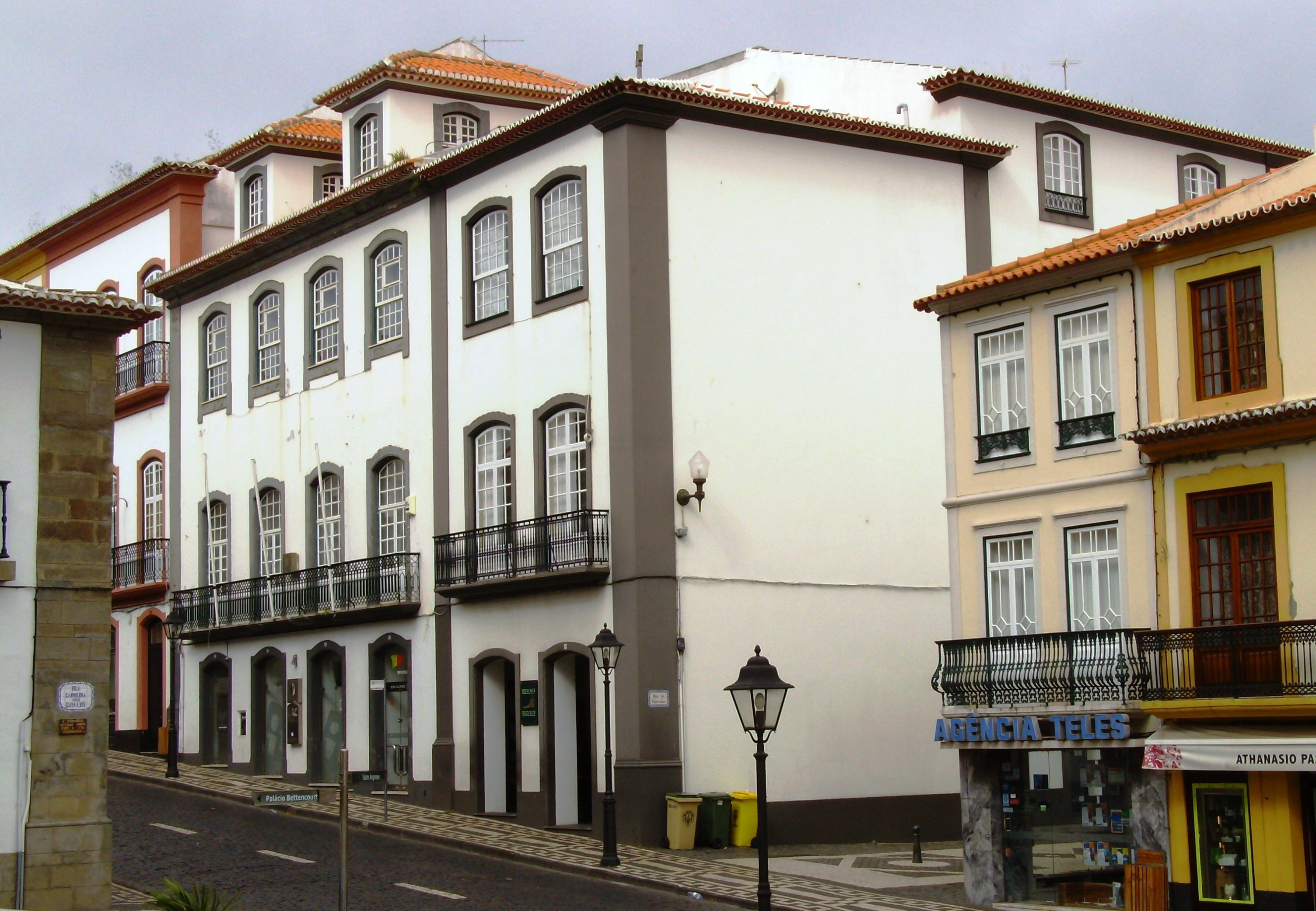 Edifício da antiga Sinagoga Ets Haim, freguesia da Sé, cidade e concelho de Angra do Heroísmo, ilha Terceira, Açores.